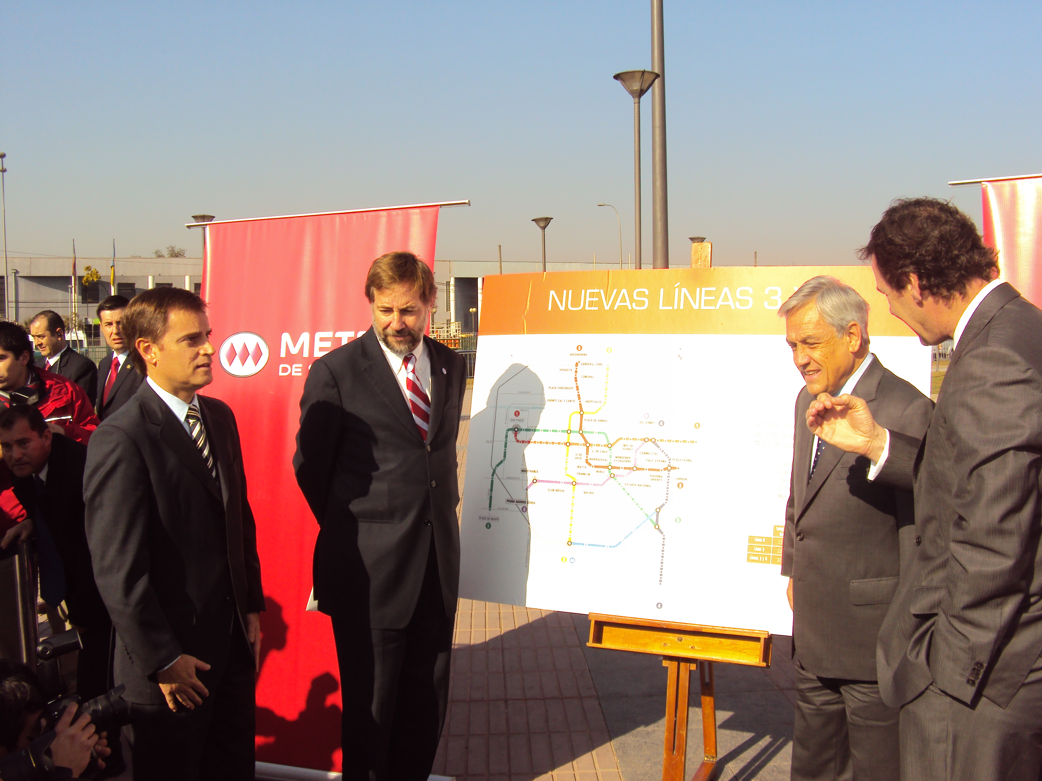 Ministro de Transportes, Pedro Pablo Errázuriz y Presidente de la República, Sebastián Piñera.